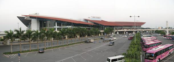 Lentoasemarakennus ulkoa.